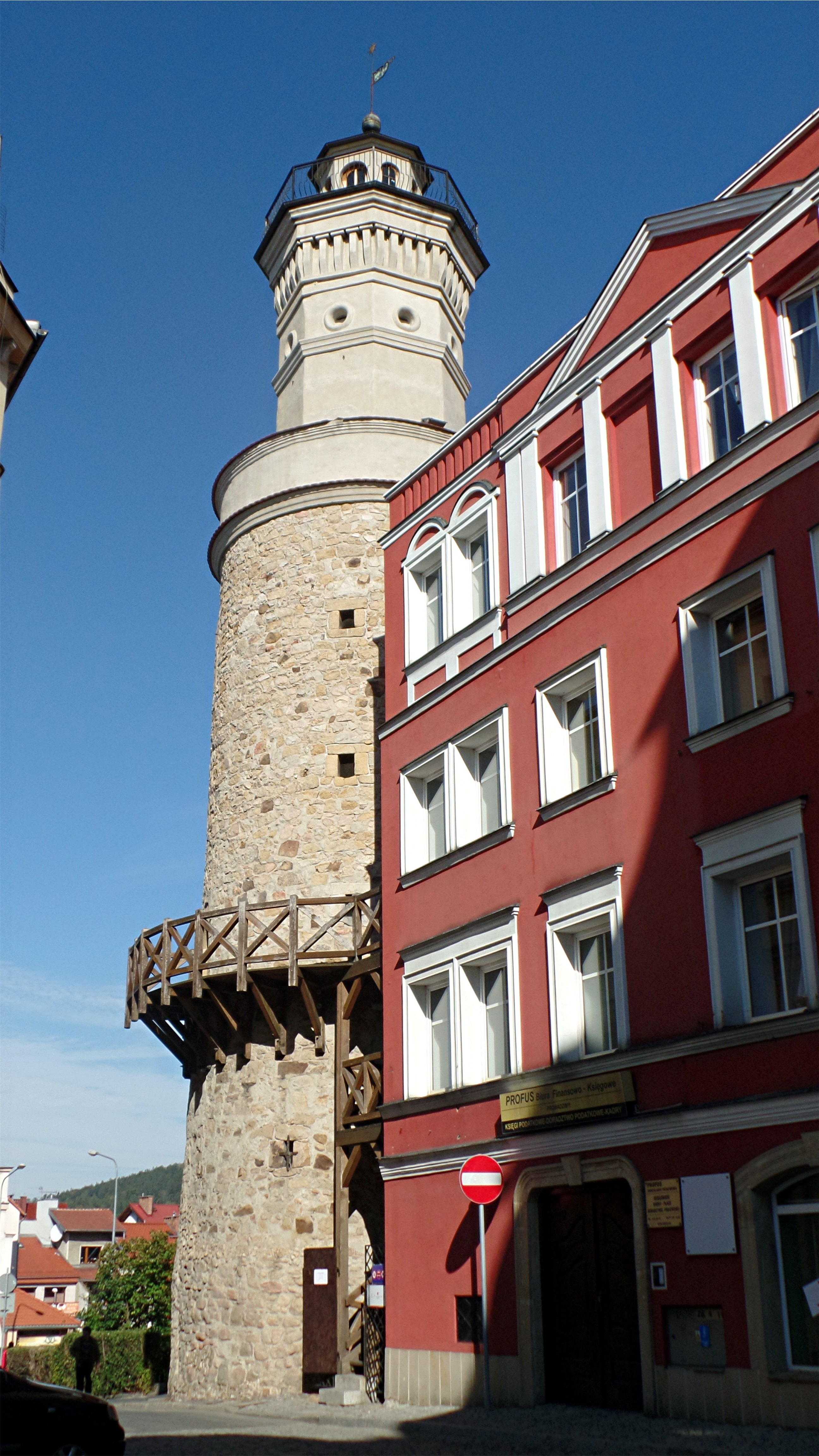 Burgtorturm als Aussichtsturm in Jelenia Góra